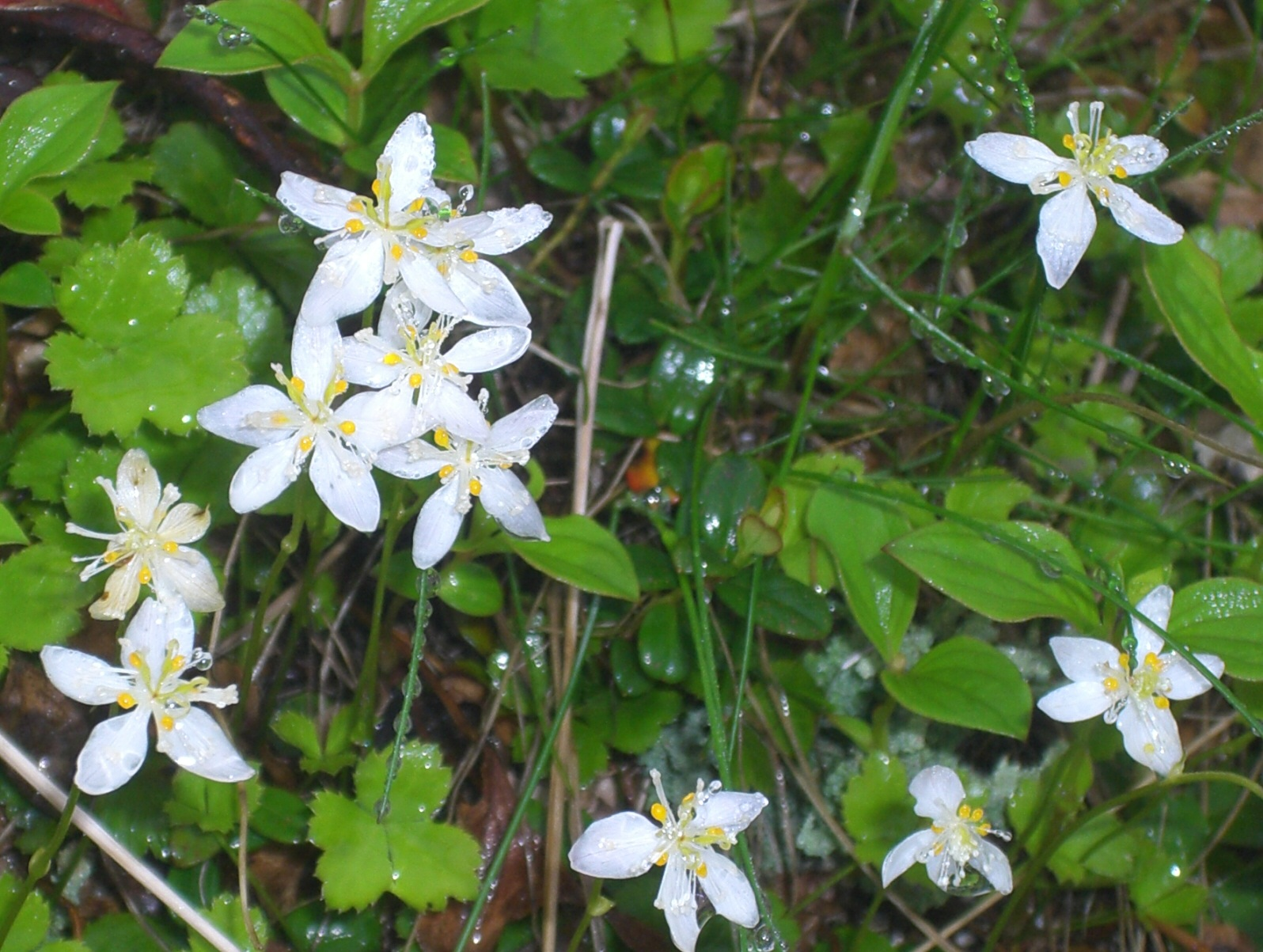 Coptis_trifolia_(L.)_Salisb at Daisetsu-zan 大雪山のミツバオウレン